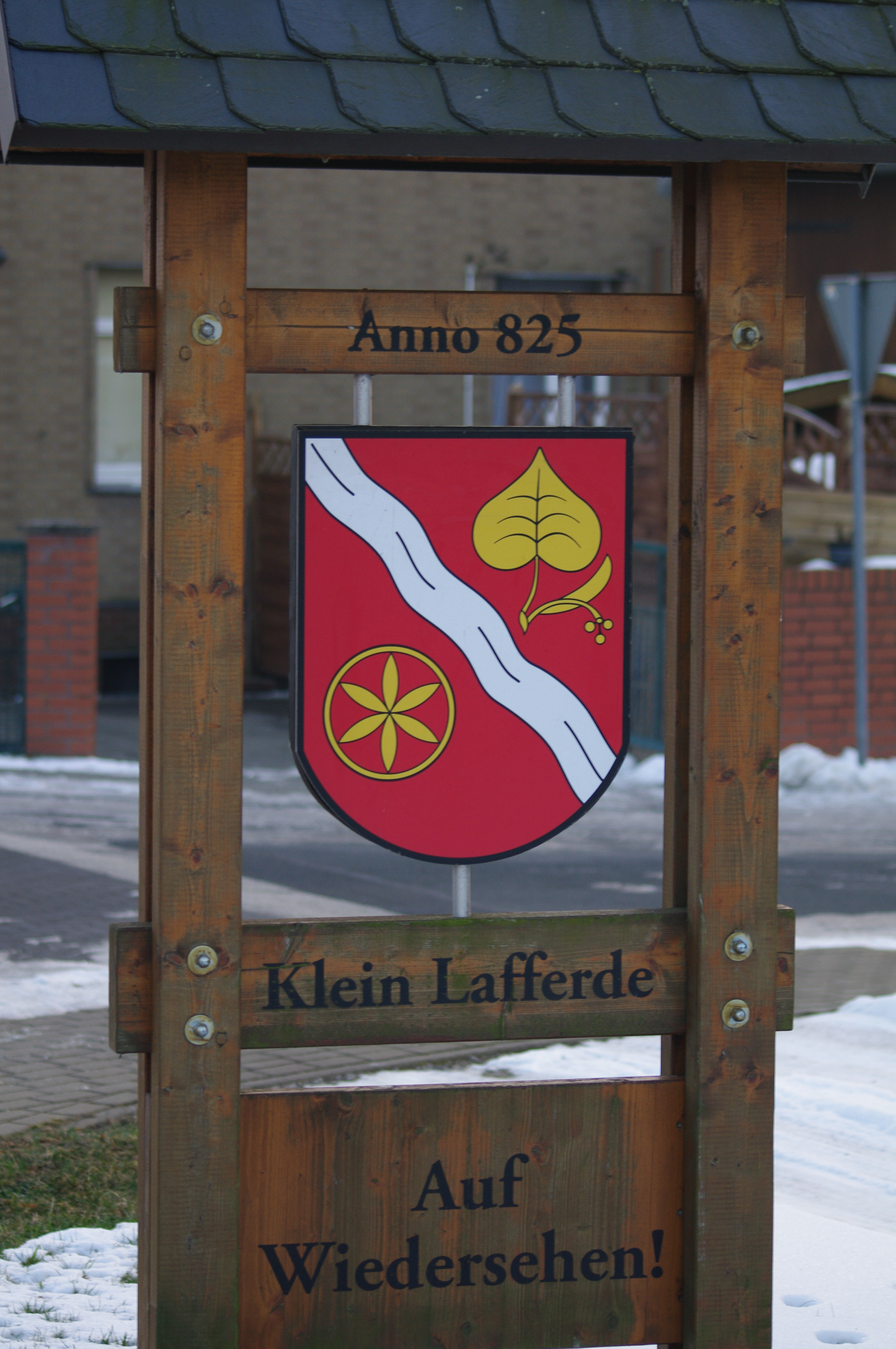 Ortsschild Klein-Lafferde